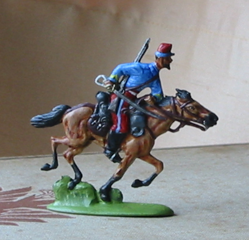 Chasseur d'afrique